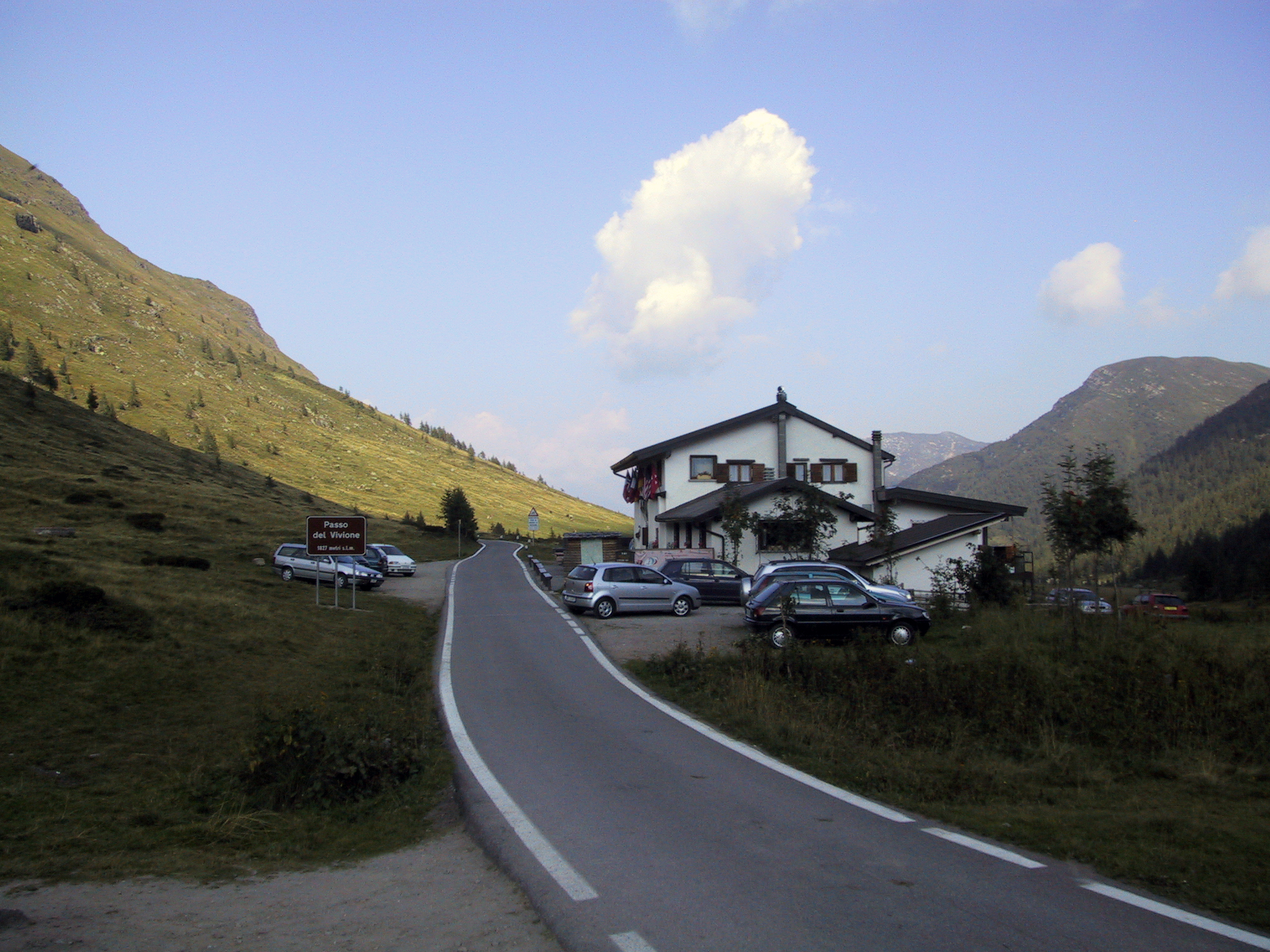 Passo del Vivione. Provincia di Bergamo